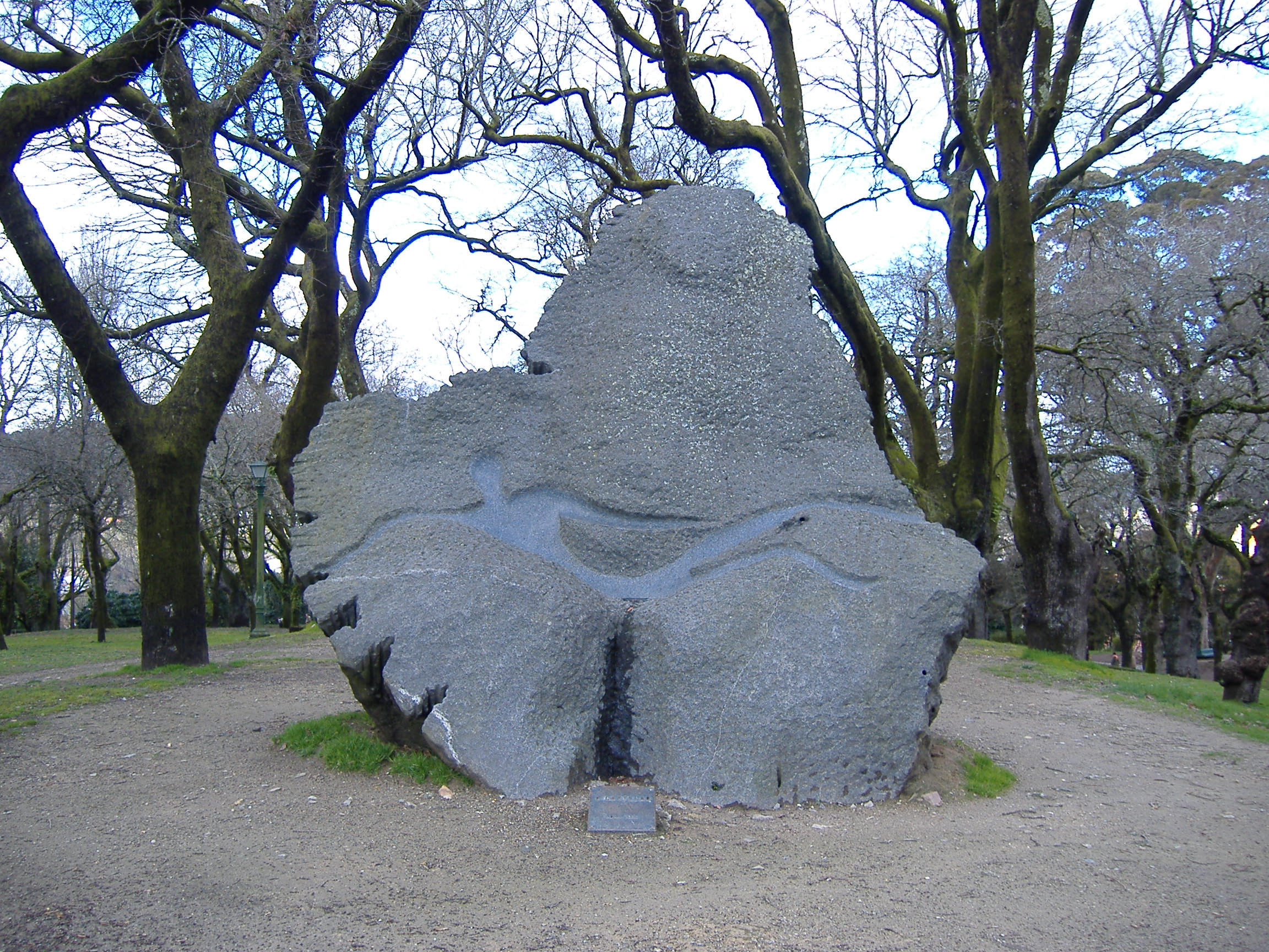 Monumento a Castelao, de Paco Leiro, na Carballeira de Santa Susana, Santiago de Compostela (1995).